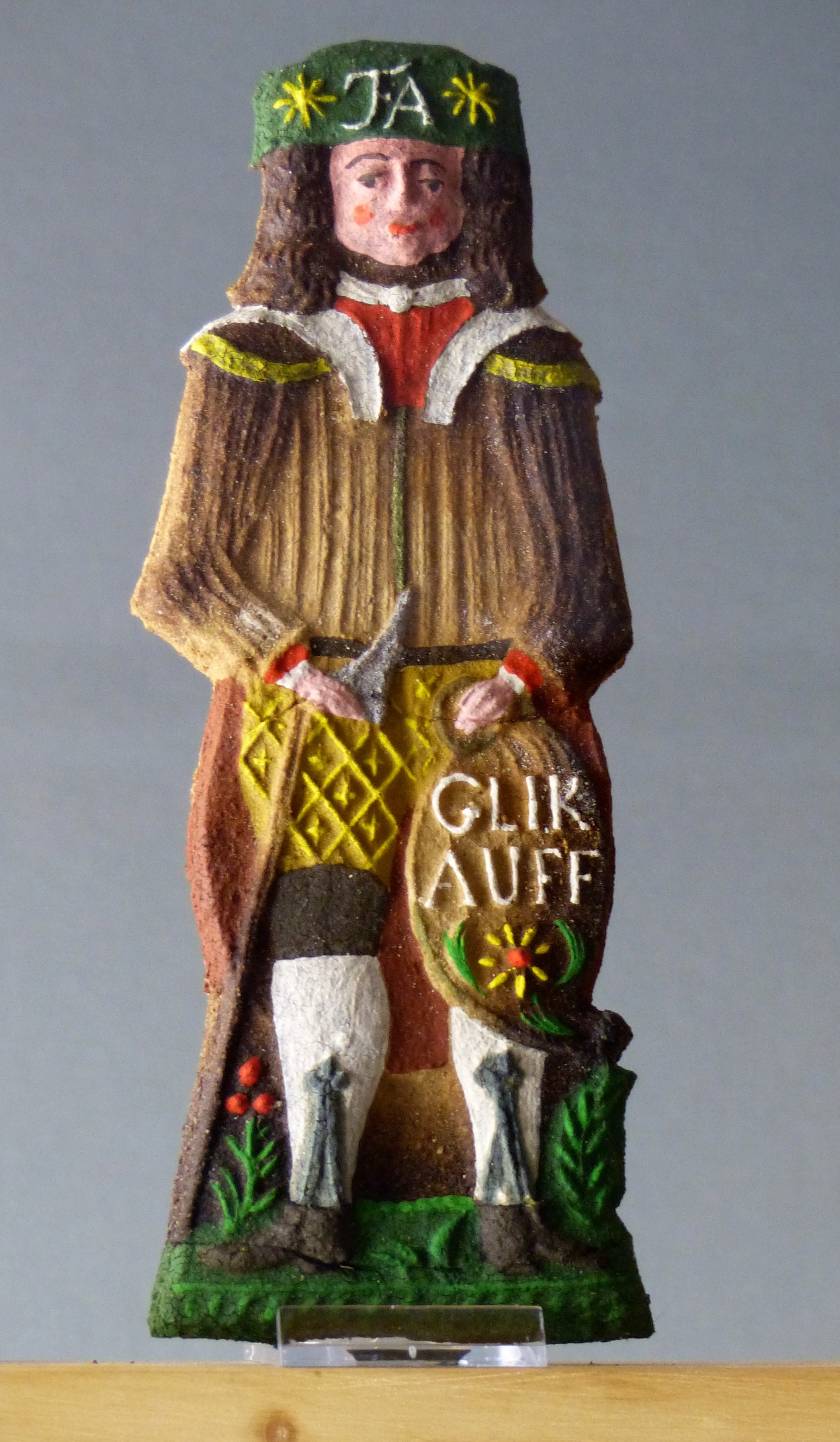 Erzgebirgsmuseum Annaberg: Bergmann aus bemaltem Salzteig, Form um 1900